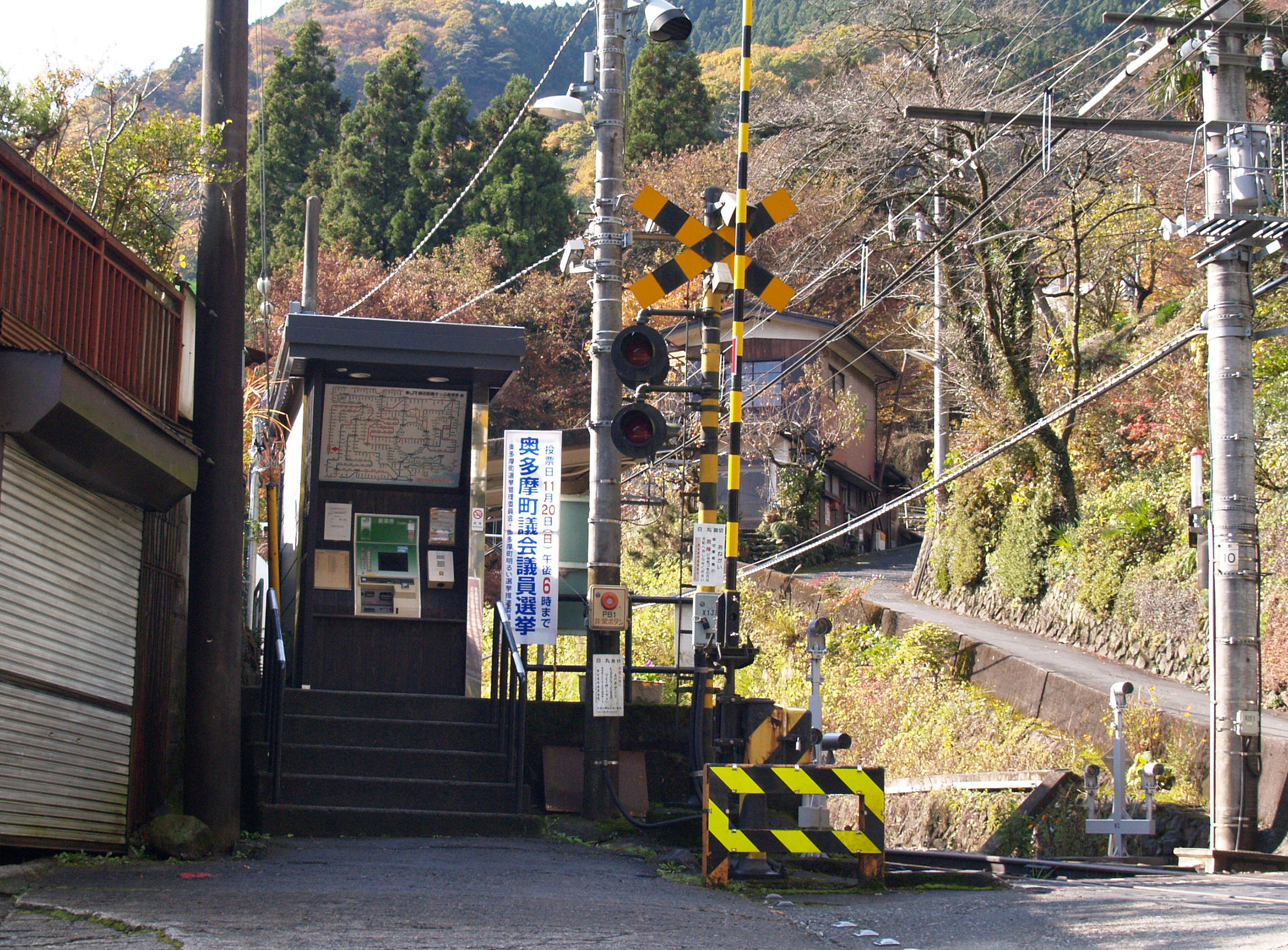 白丸駅 (東京都)入口